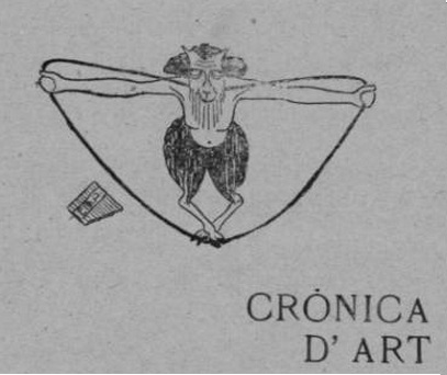 Il·lustració Art Jove. Capçalera.